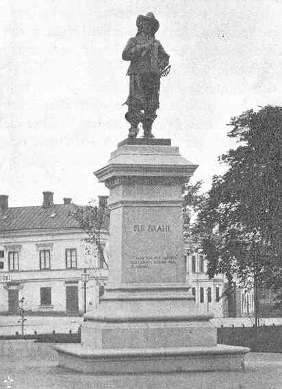 Per Brahes staty i Åbo, vid skvären invid domkyrkan. Ur verket "Finland i ord och bild" av O. M. Reuter, tryckt i Stockholm 1901, sidan 321. Bronsstaty vid Åbo domkyrka. Skulptör: Walter Runeberg (1838-1920). Statyn återger greve Pehr Brahe den yngre (1602-1680) vid invigningen av Åbo akademi den 15 juli 1640 hållande fundationsbrevet i handen. Brahestatyn avtäcktes i Åbo den 29 maj 1888 i närvaro av en folksamling om ca 10 000 personer. På granitsockeln citeras Per Brahes ord: "Jach war med landett och landett med mig wääl tillfreds." Samma år restes en mindre replik av statyn på torget i Brahestad (finska: Raahe).